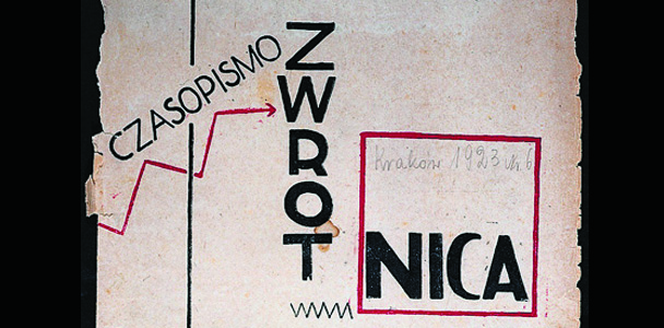 Strona tytułowa czasopisma "Zwrotnica", nr 6, Kraków, 1923 r.